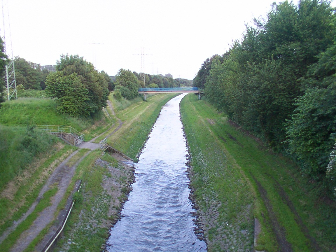 Emscher in Ickern (von der Horststraße aus aufgenommen)